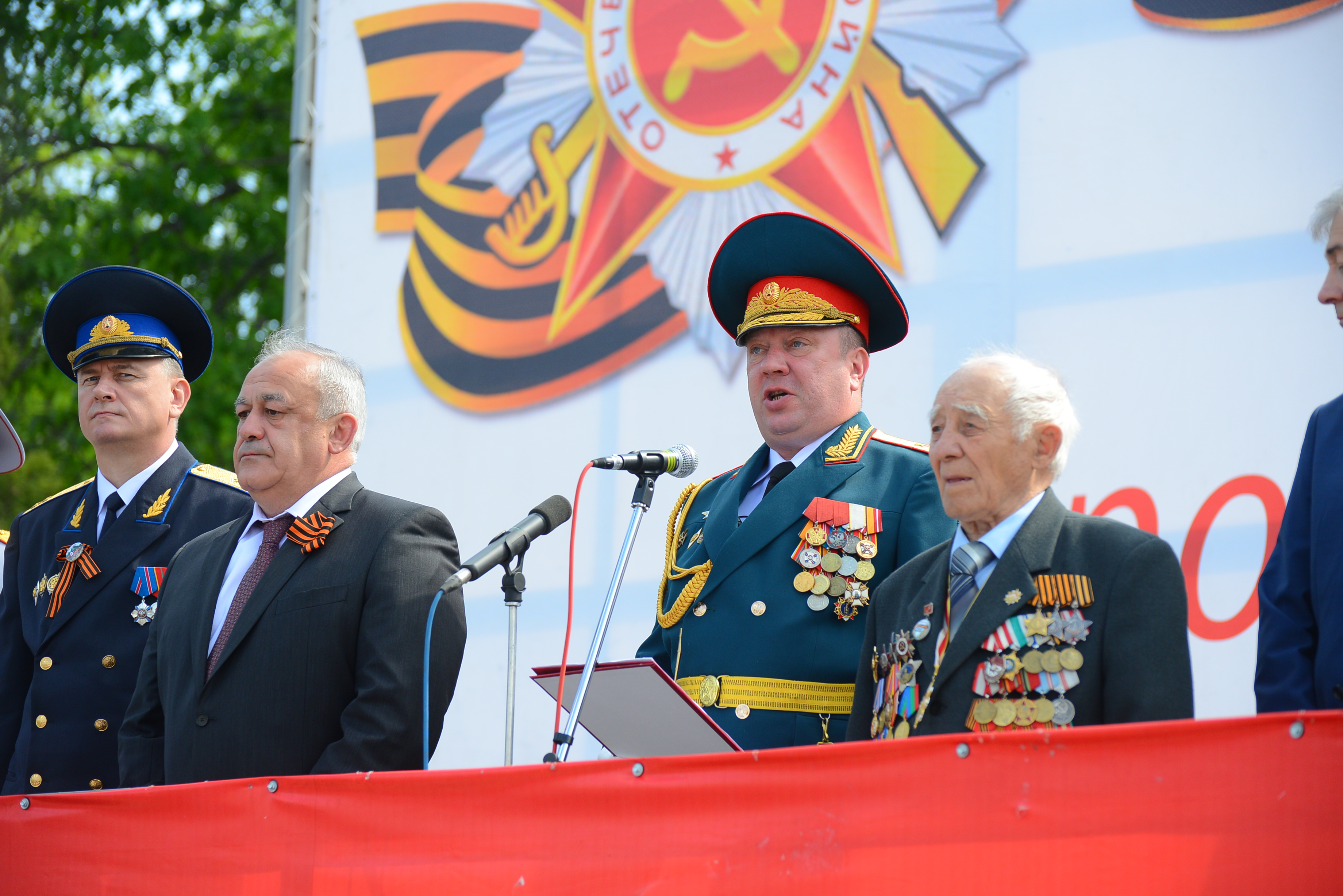 Парад победы 9 мая 2013 года во Владикавказе